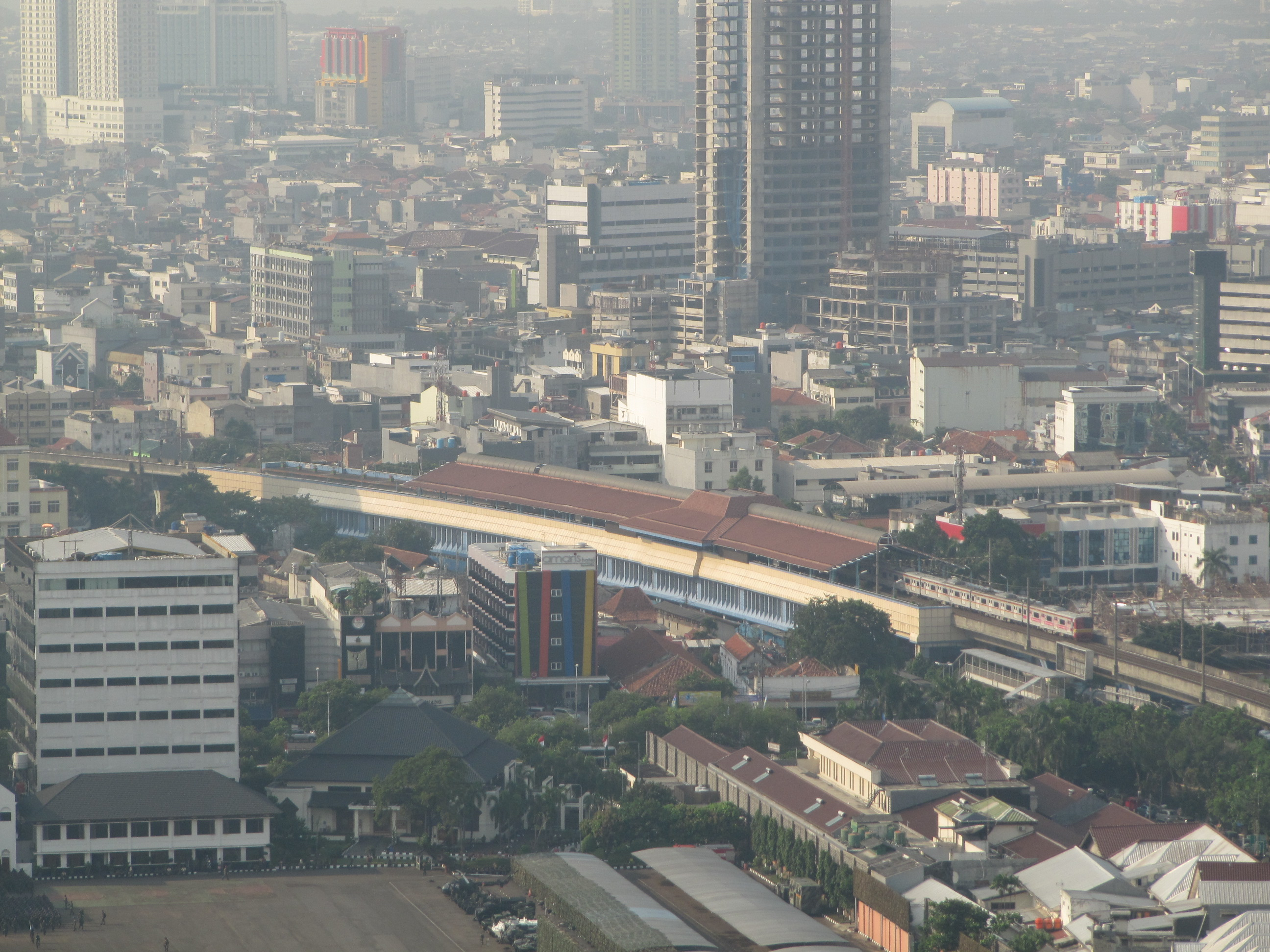 Station Juanda